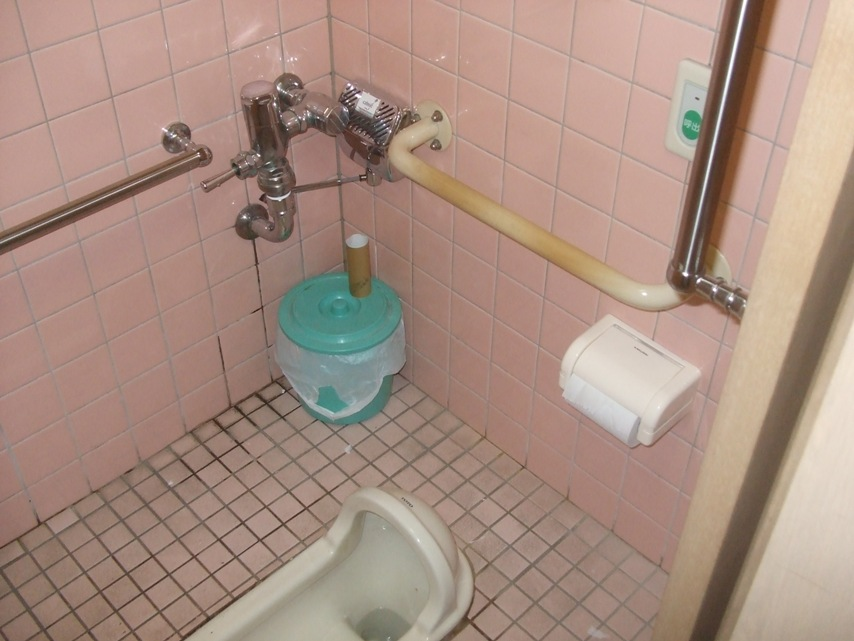 C75+Calmic-MK7。